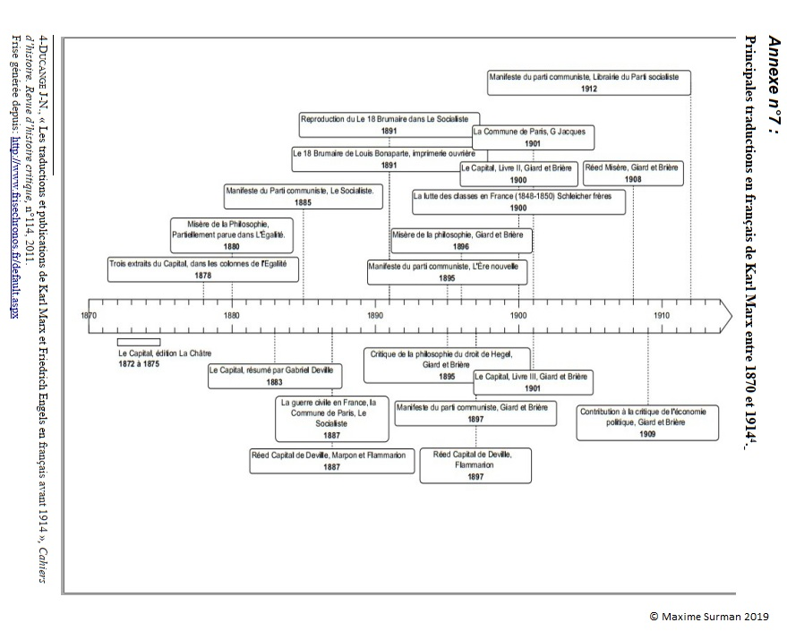 Frise chronologique